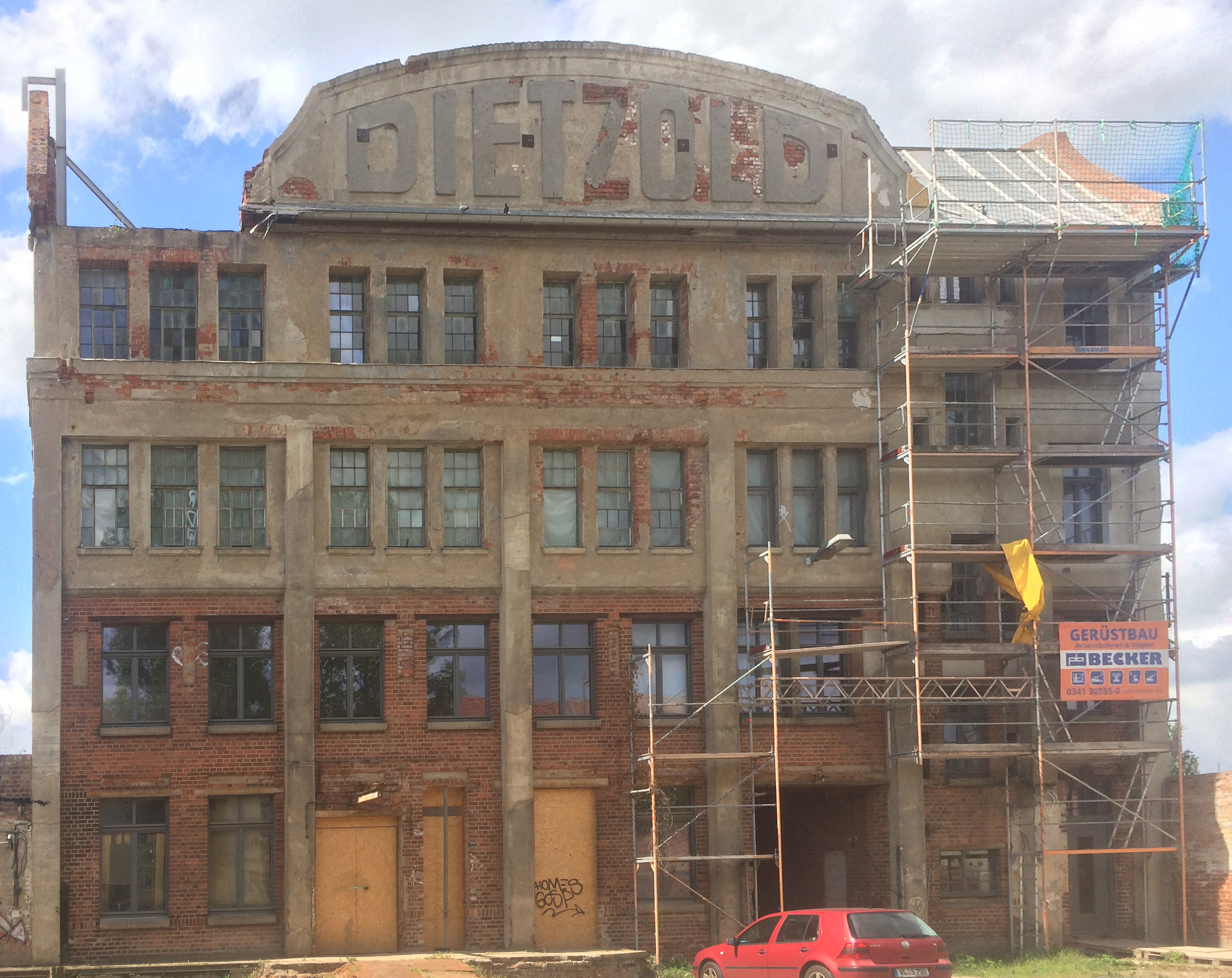 Dietzoldwerke Leipzig 2020 sonnig